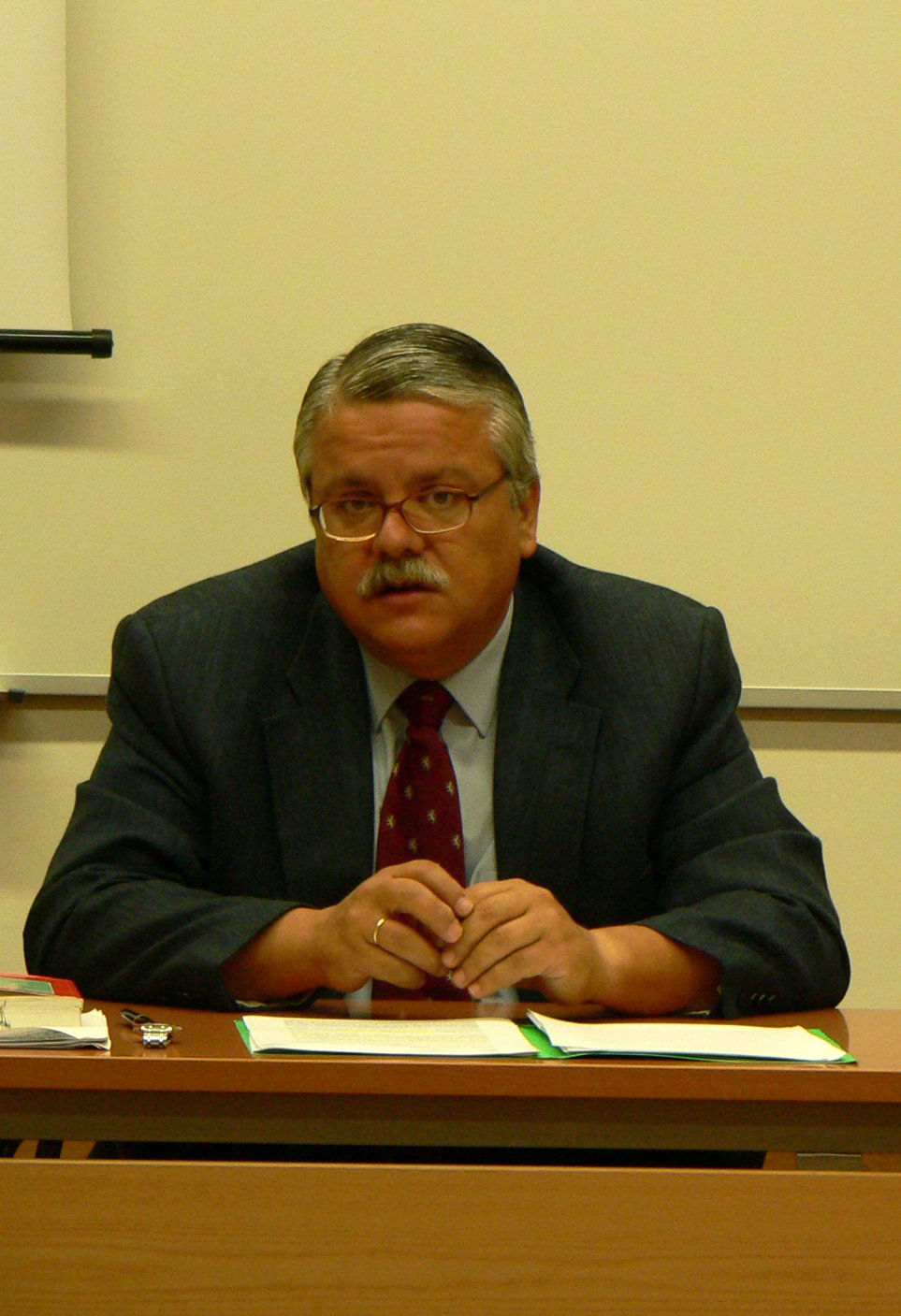 Bernardo del Rosal Blasco es Catedrático de Derecho Penal de la Universidad de Alicante. Intervino en Baeza en el curso de la Universidad Internacional de Andalucía "La reforma del Código Penal. Respuestas para una sociedad del siglo XXI"